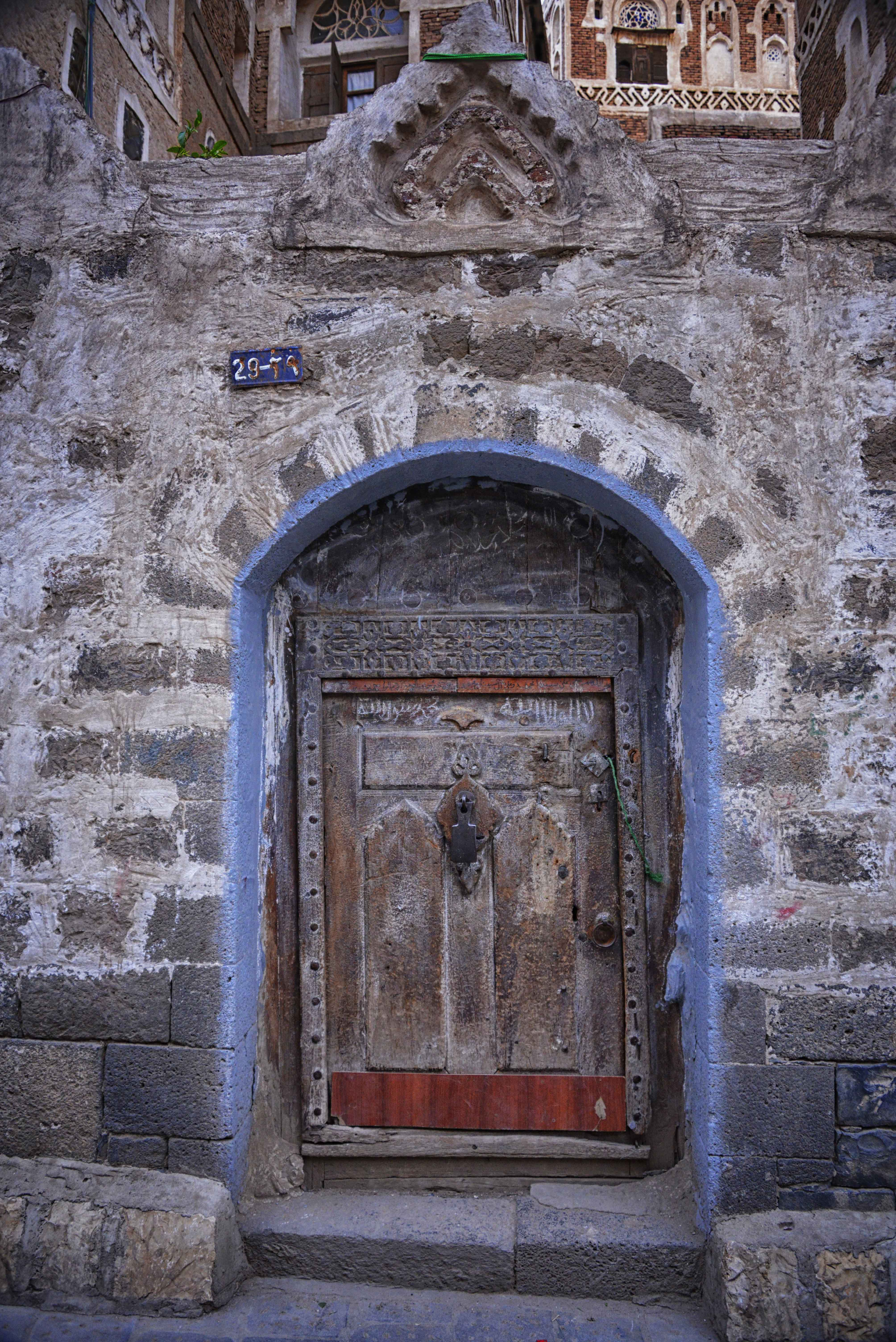 Yemen